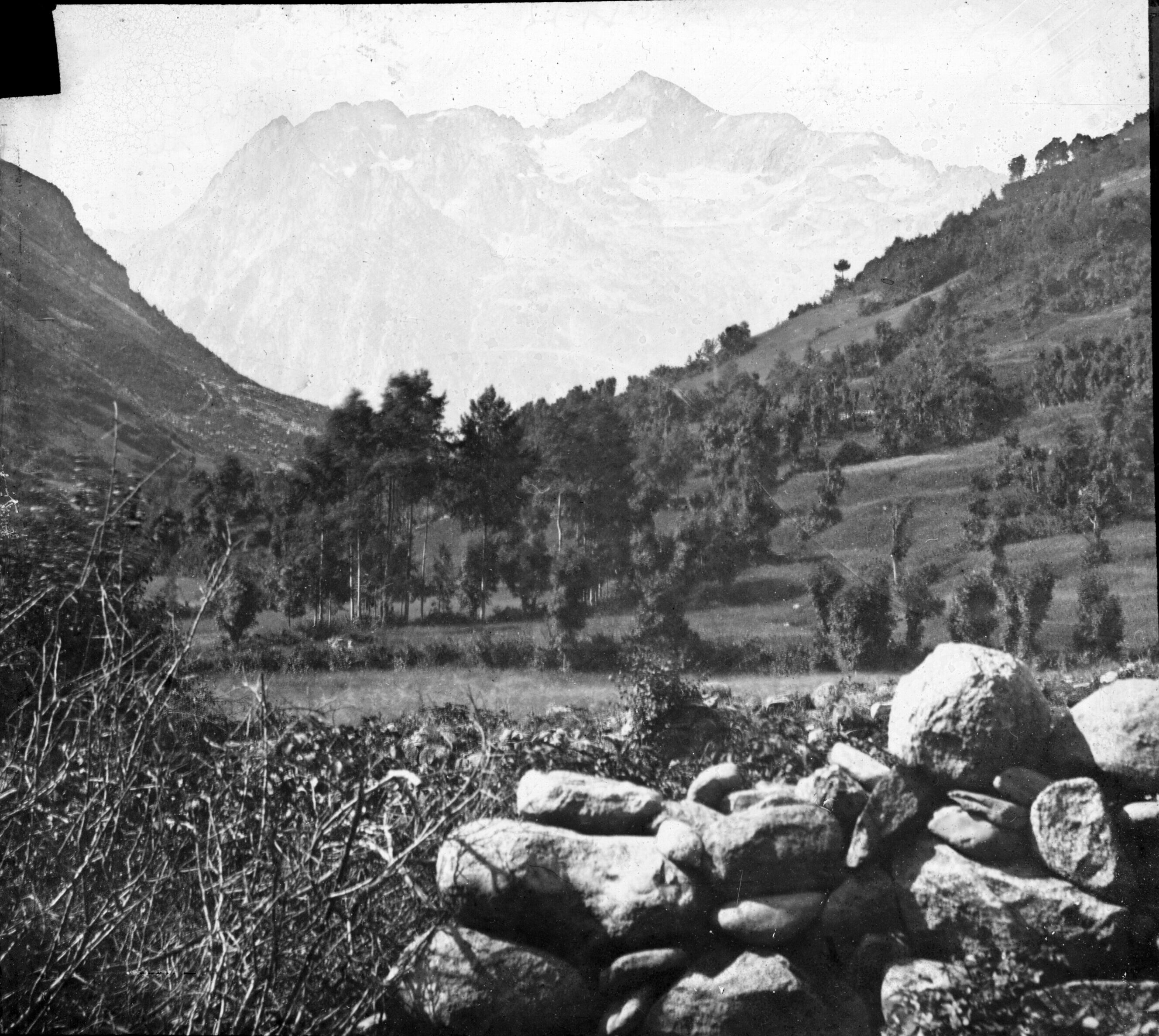 Fonds Trutat - Photographie ancienne Cote : TRU C 488 Localisation : Fonds ancien Original non communicable Titre : Le Montarto vu d'Artias, Val d'Aran Auteur : Trutat, Eugène Rôle de l’auteur : Photographe Lieu de création : Val d'Aran (Espagne) Date de création : 20e siècle Mesures : 10 x 9 cm Mot(s)-clé(s) : -- Montagne -- Sommet (montagne) -- Vallée -- Végétation -- Arbre -- Résineux -- Rocher -- Pierre -- Broussaille -- Gourdon, Maurice -- Val d'Aran (Espagne) -- Montarto (Espagne : massif) -- 20e siècle Médium : Photographies Médium : Positifs sur plaque de verre -- Noir et blanc -- Positifs sur plaque de verre -- Paysages de montagne Bibliothèque de Toulouse. Domaine public